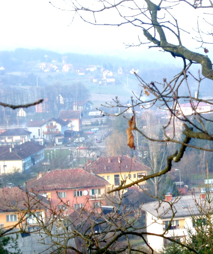 Stanari